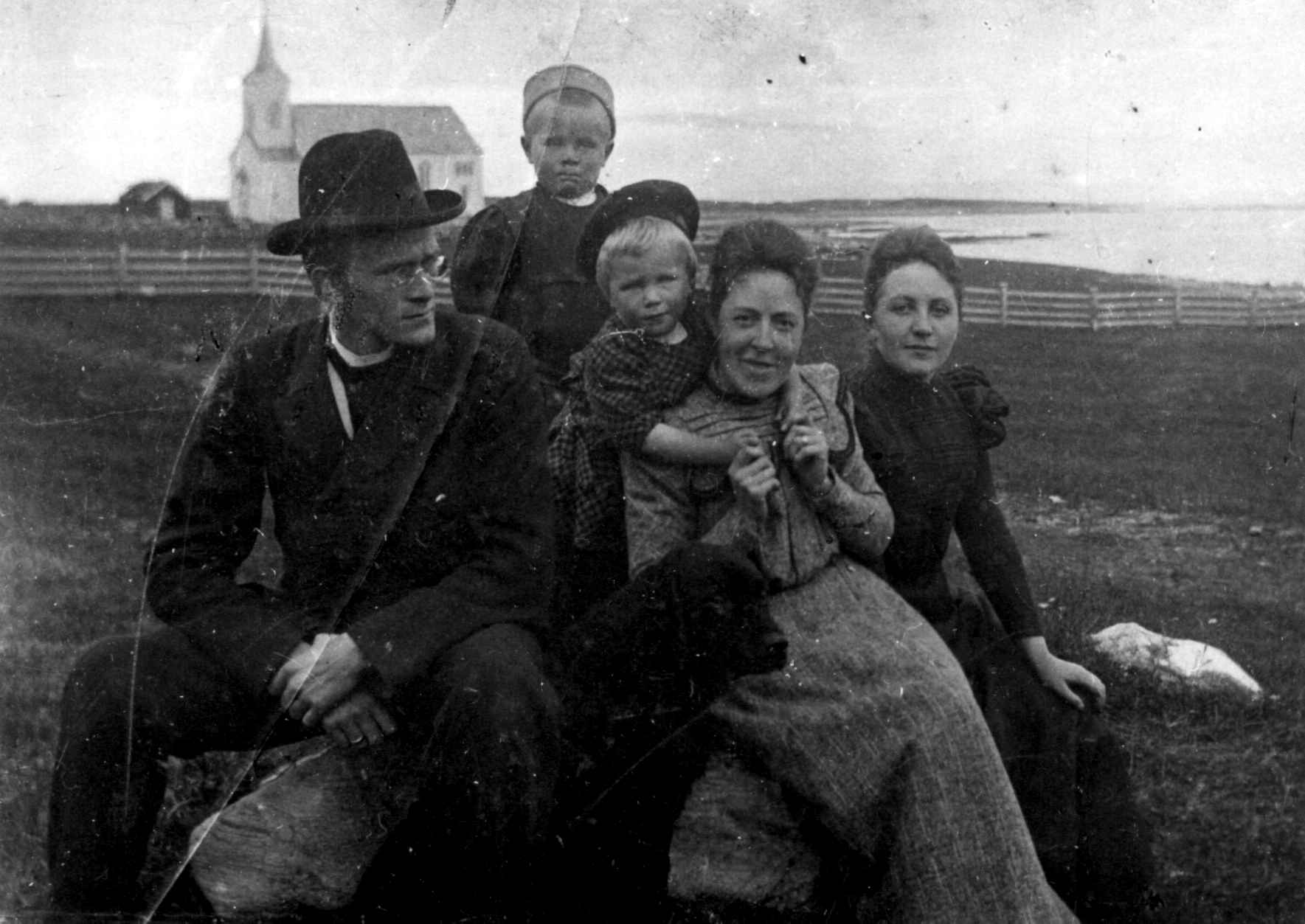 Sogneprest Jens Otterbech (1868-1921), Hanna Marie Otterbech (helt til høyre) med barna Haakon eller Werner og Anna. Kvinnen er antakelig lærerinne Amalie Thomassen som var ansatt hos sognepresten. Kistrand kirke i bakgrunnen. Bildet er fra omkring 1902-1903.